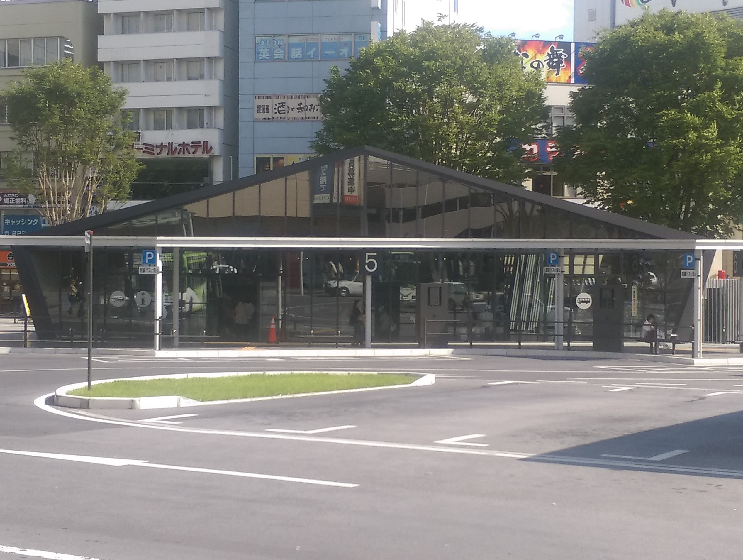 甲府駅バスターミナル内にある甲府駅前バスセンターと甲府市観光案内所